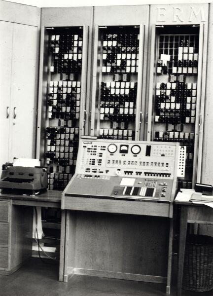 ERMETH